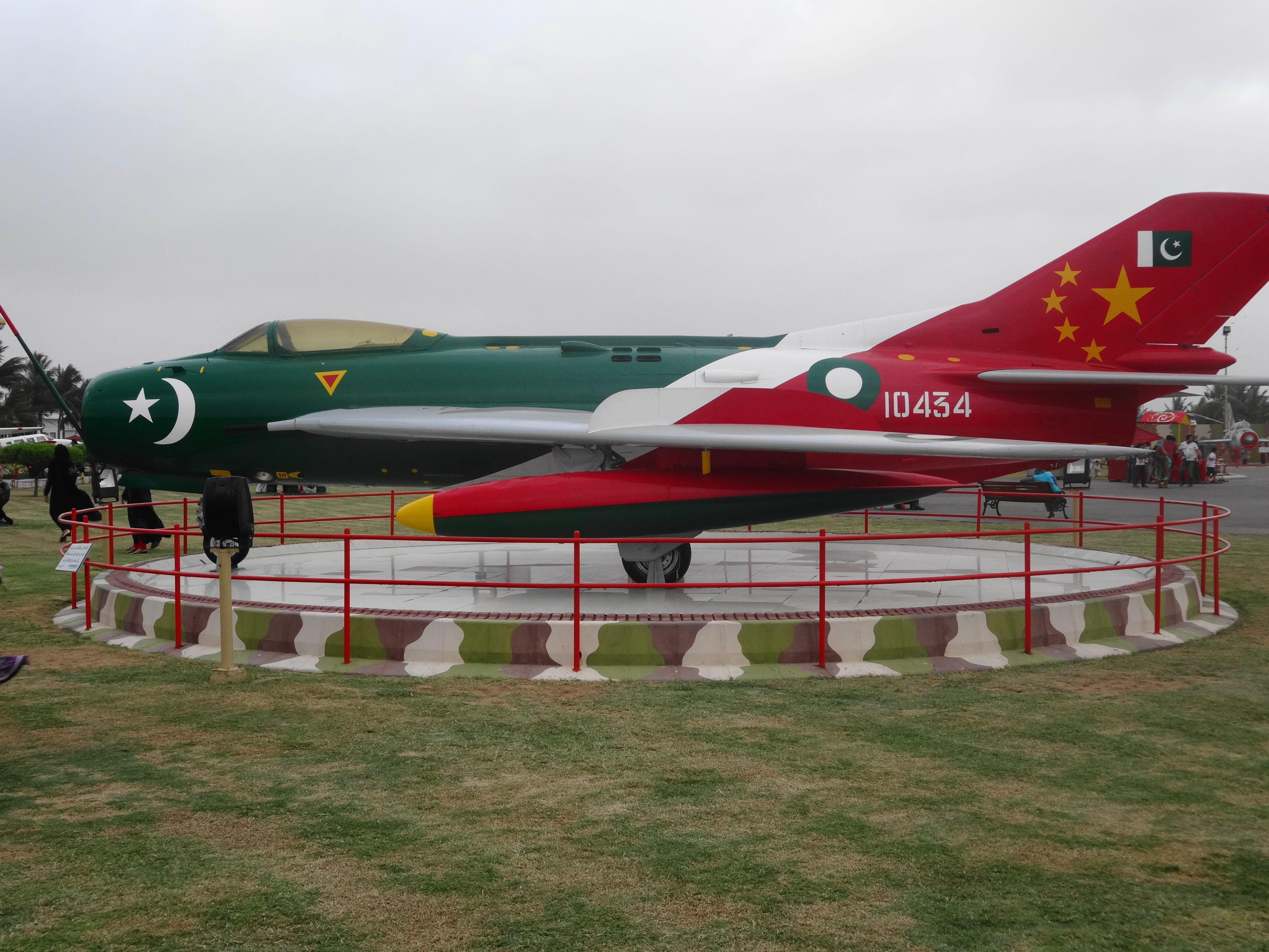 PAF Karachi